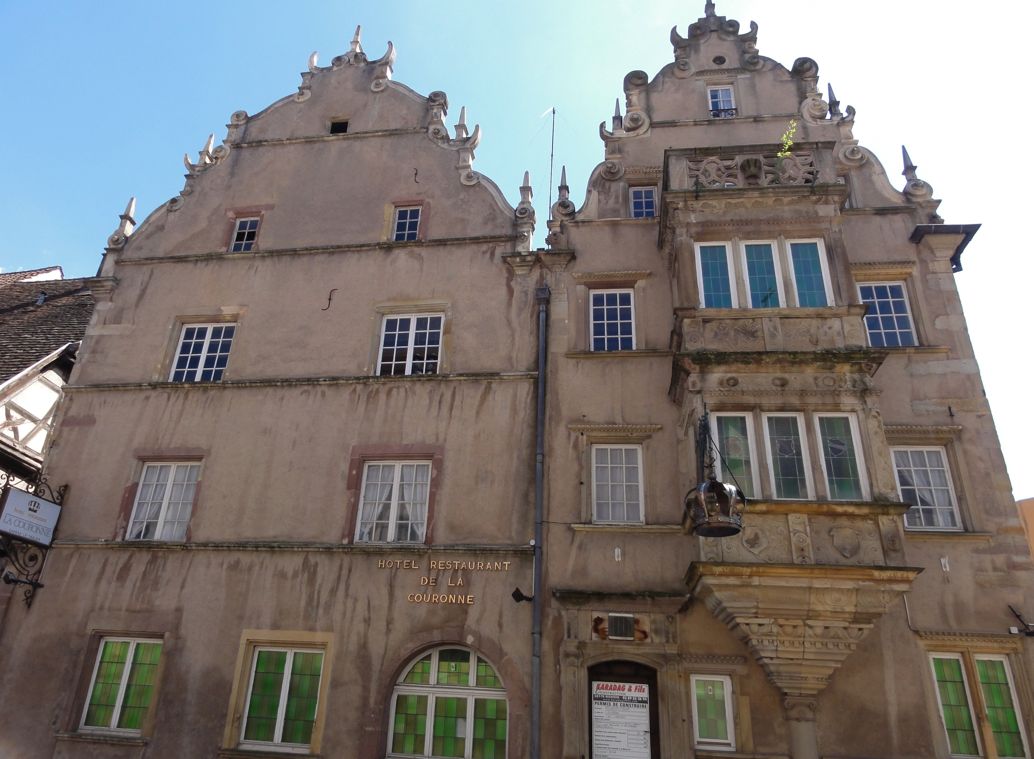 Alsace, Haut-Rhin, Ensisheim, Auberge de la Couronne (1610), 47 rue de la Première-Armée-Française. It is indexed in the Base Mérimée, a database of architectural heritage maintained by the French Ministry of Culture, under the references PA00085422 and IA00074237.